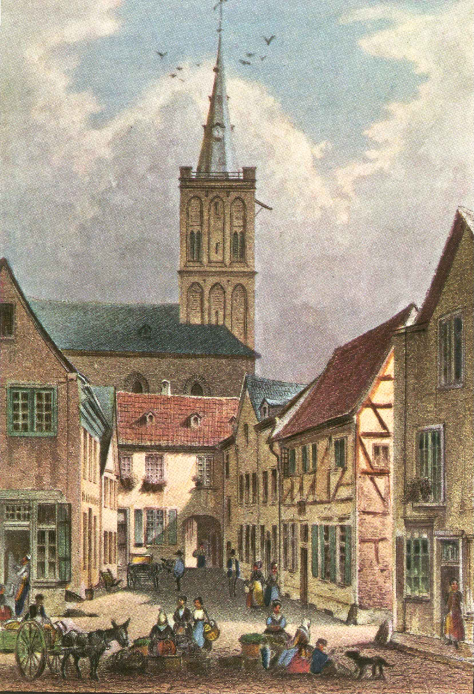 Krefeld Schwanenmarkt um 1850